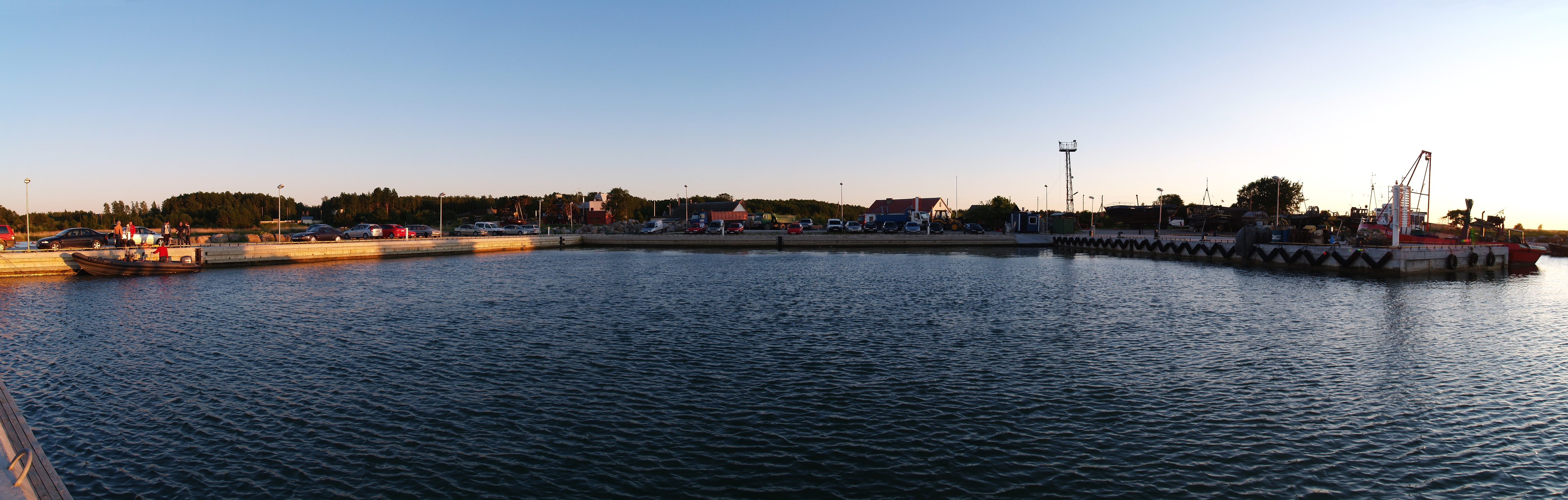 Leppneeme sadama panoraam